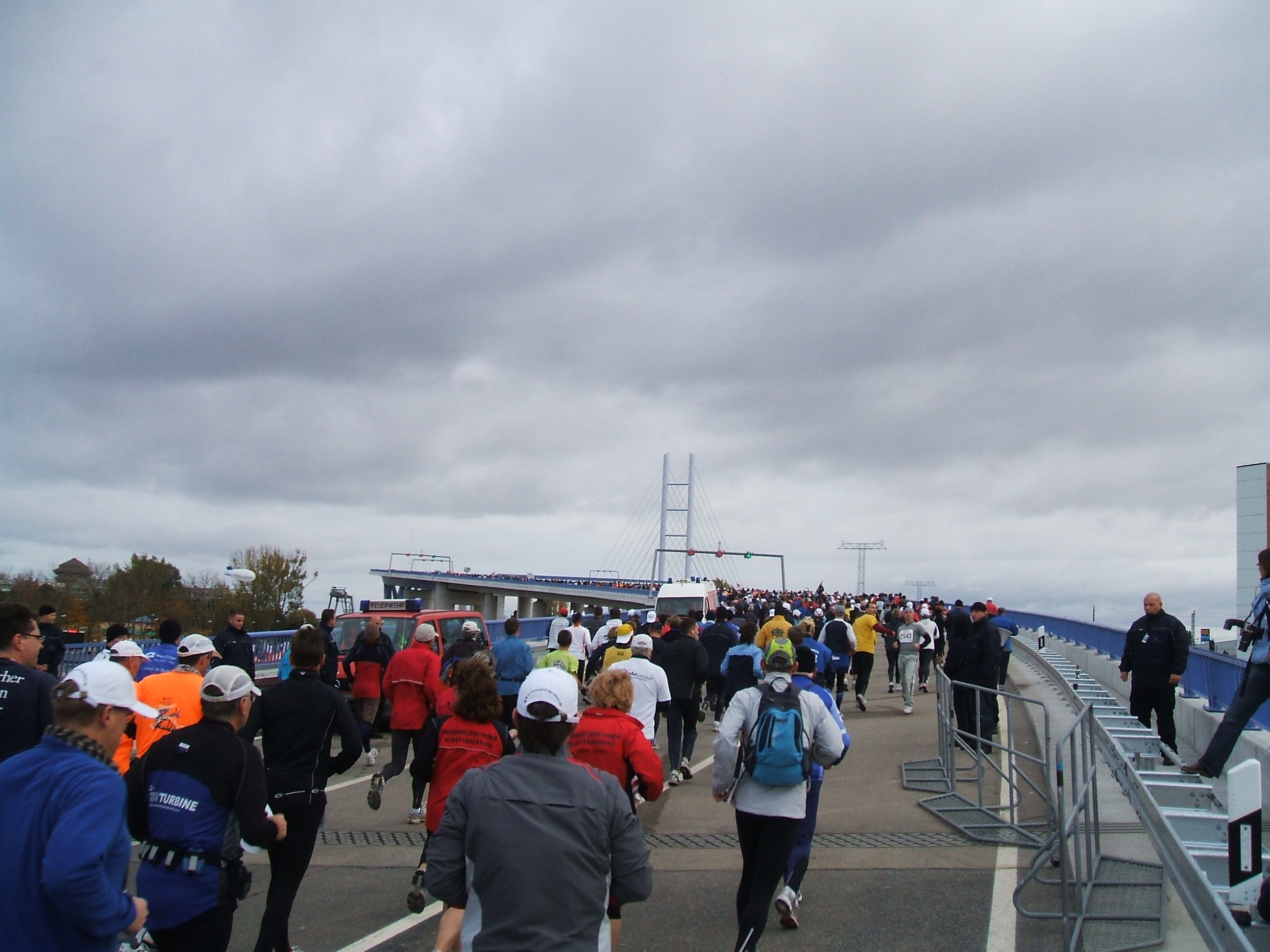 Rügenbrücke mit Läufern zum 10-km-Brückenlauf